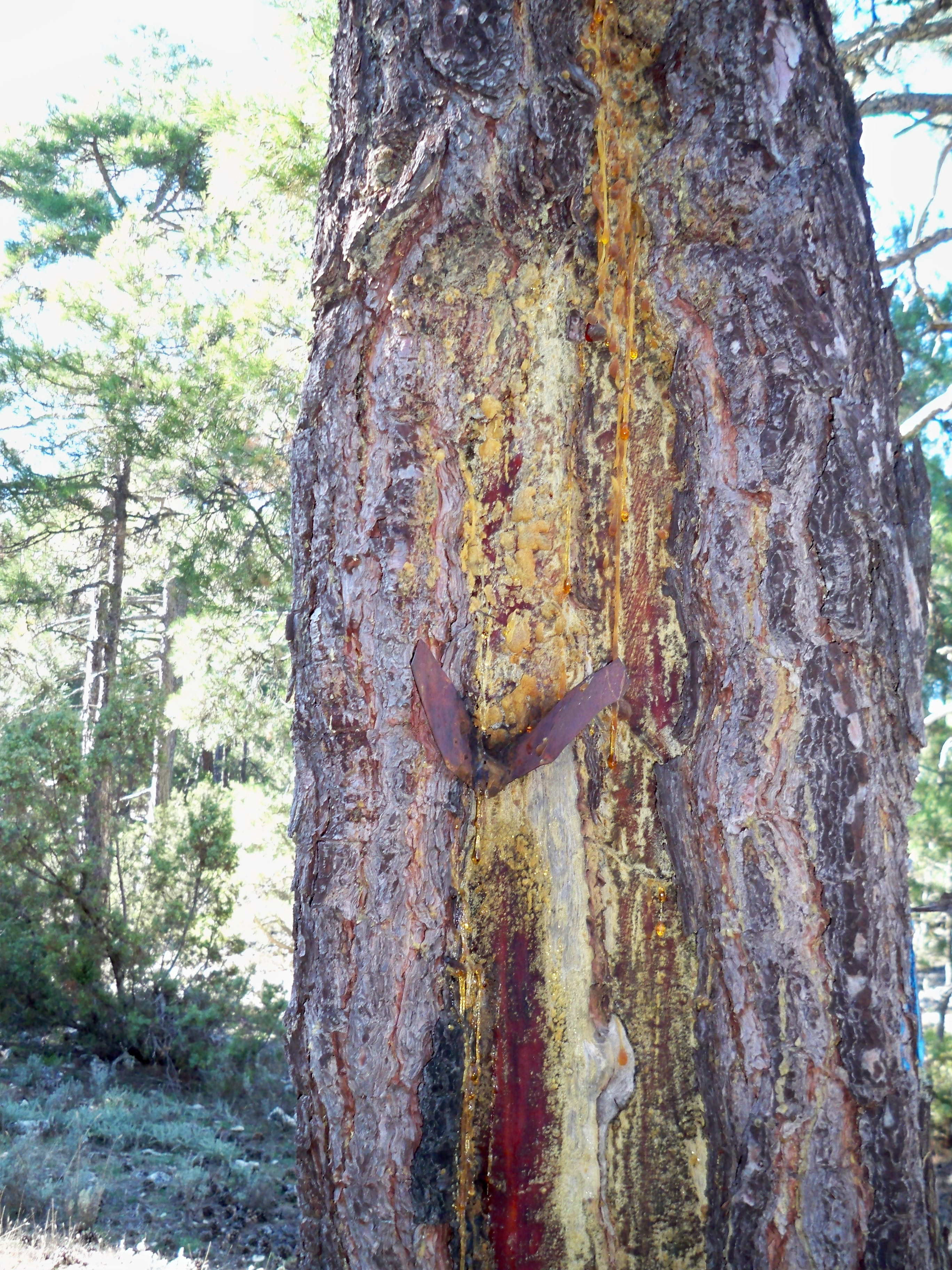 Tronco de pino tras la extracción de la resina en el paraje conocido como el Molejón, cerca de la localidad de El Pardal (Molinicos - Albacete)